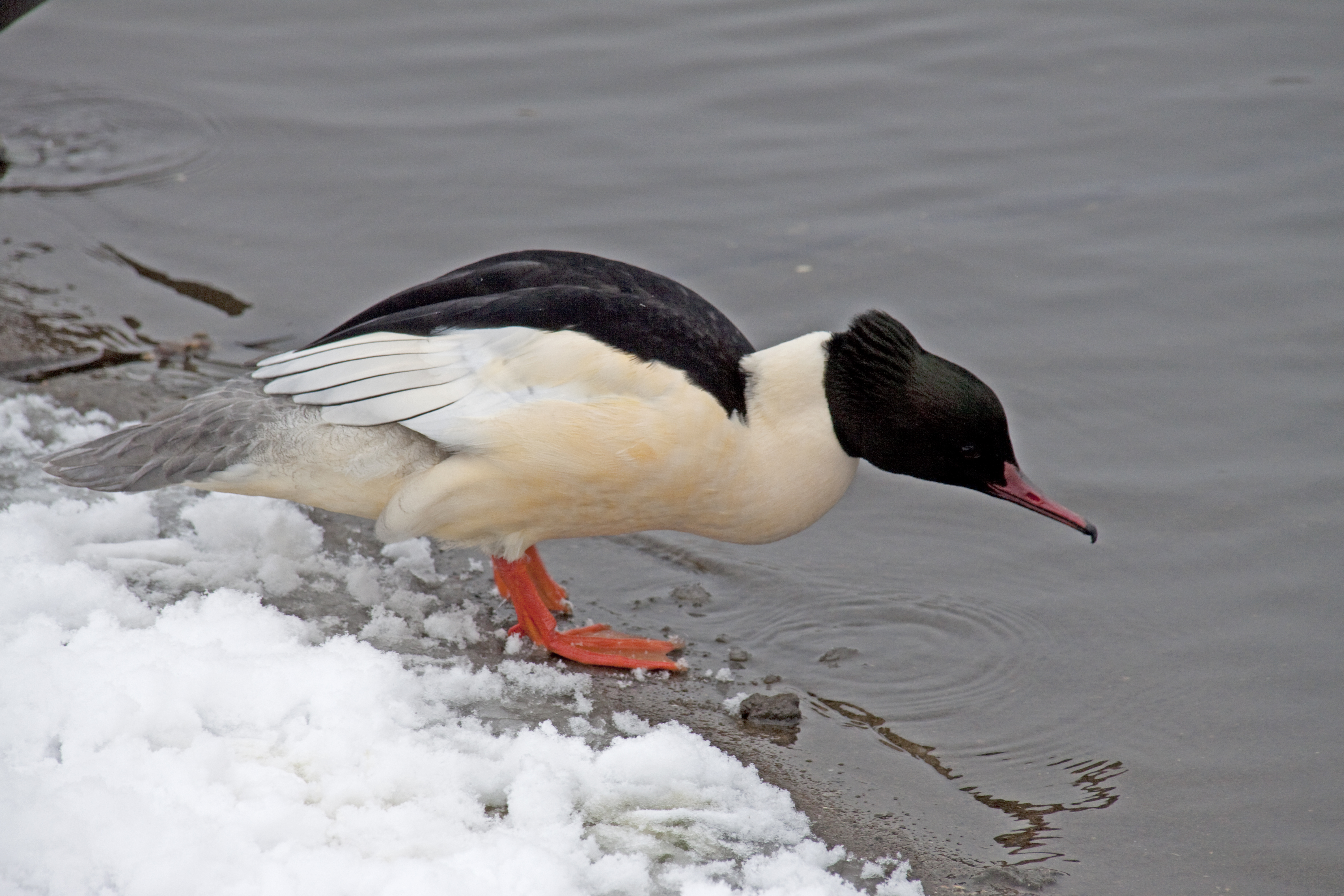 Male Goosander 2